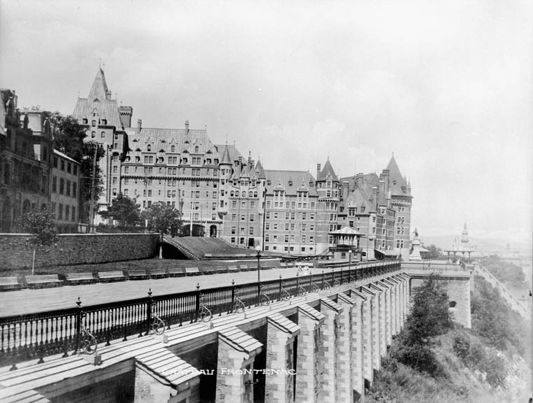 Le Château Frontenac à Québec (Canada) circa 1900-1925; Château Frontenac in Quebec City ca 1900-1920